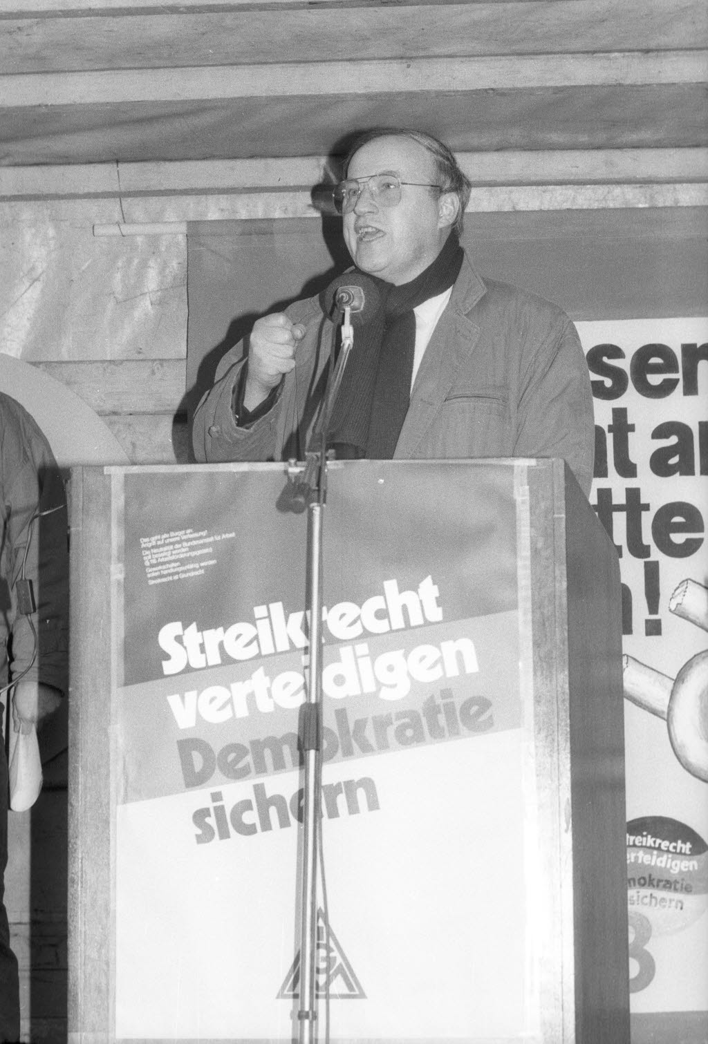 auf dem Rathausplatz. Die geplante Veränderung des § 116 des Arbeitsförderungsgesetzes (AFG) sieht eine Streichung des Kurzarbeitergeldes für indirekt vom Streik betroffene Arbeitnehmer vor. Im Bild der SPD-Landesvorsitzende Günther Jansen am Redepult.